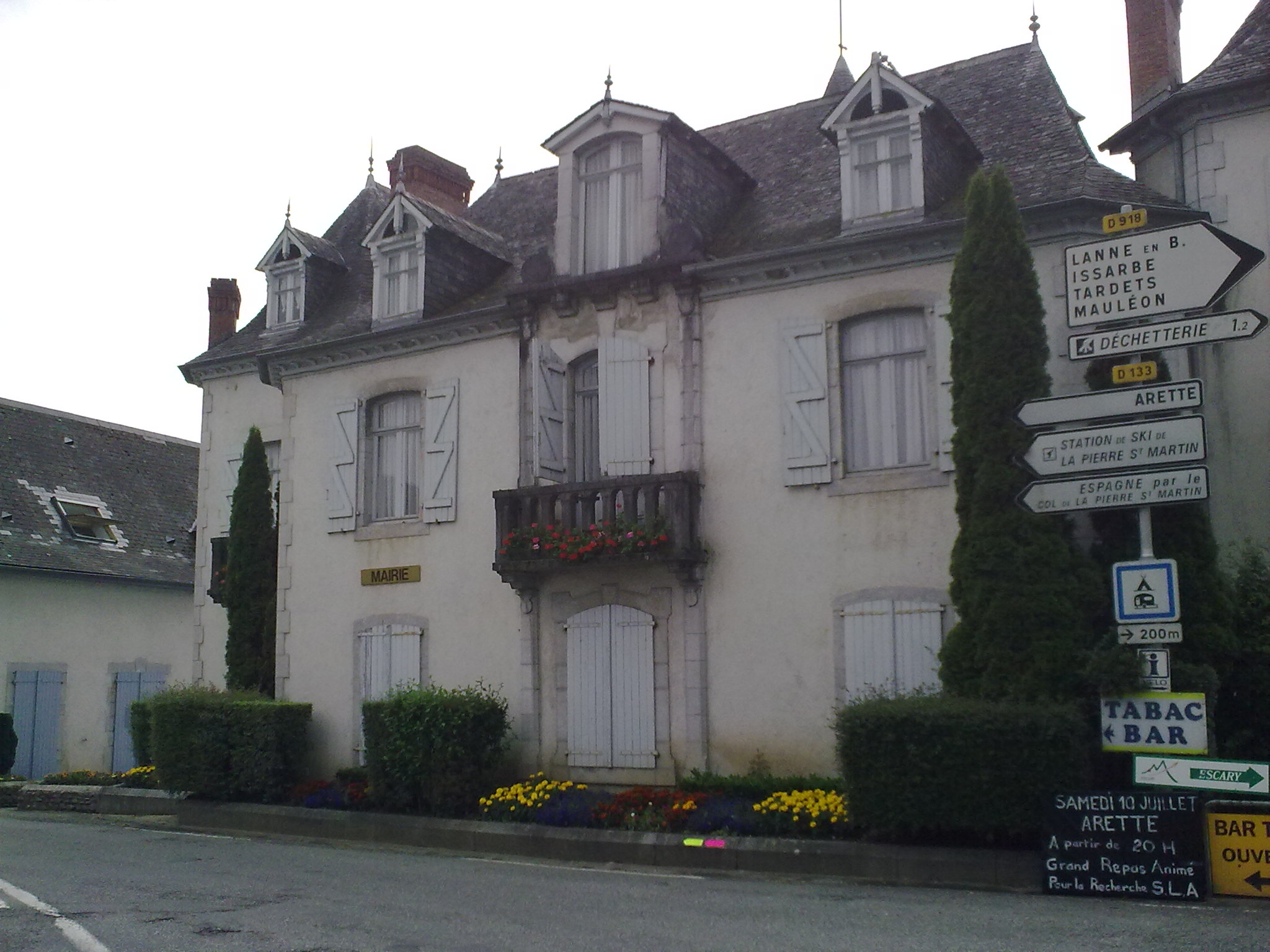 Aramits e 4 juillet 2010.